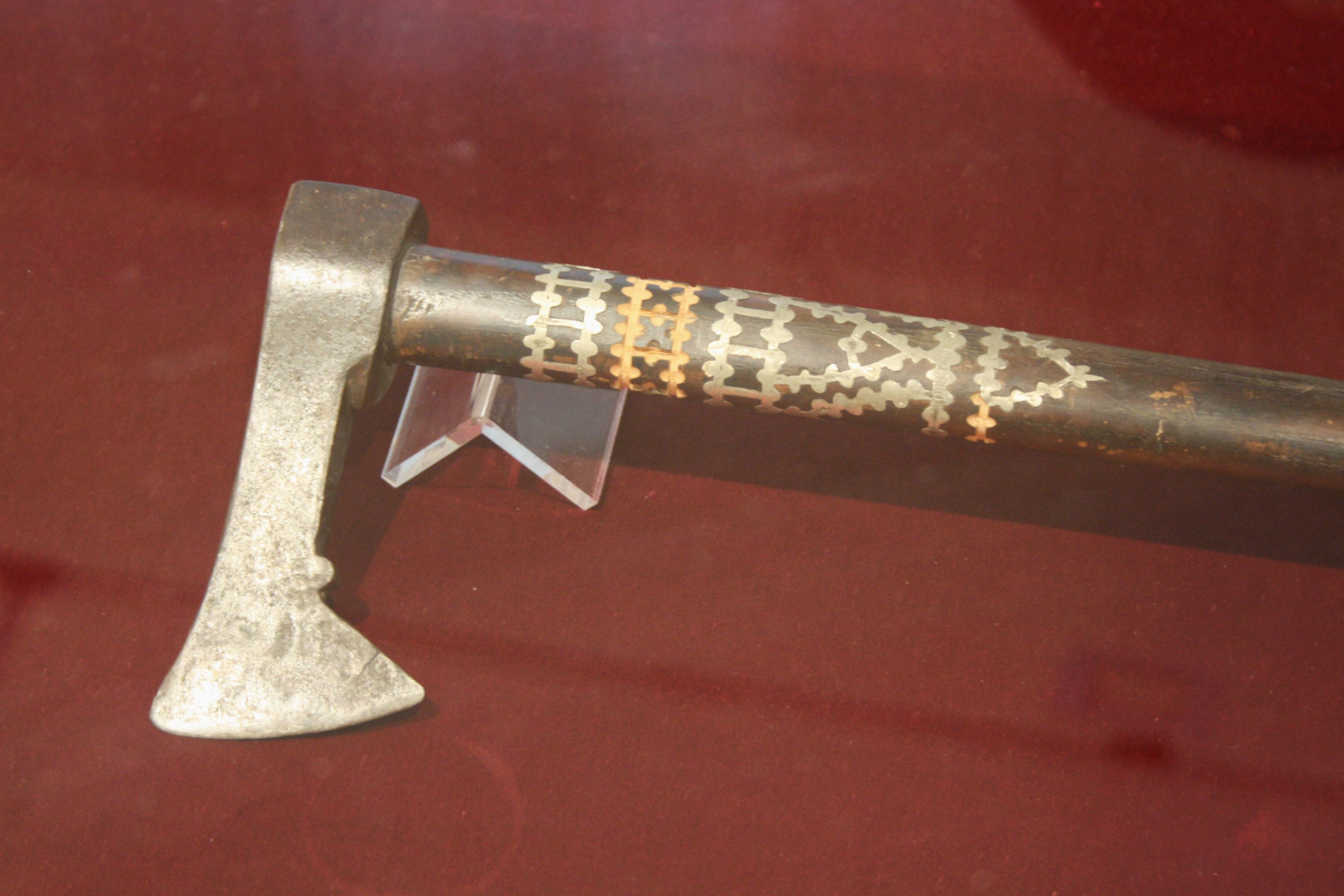 Národopisné muzeum - Musaion: Ondrášova valaška